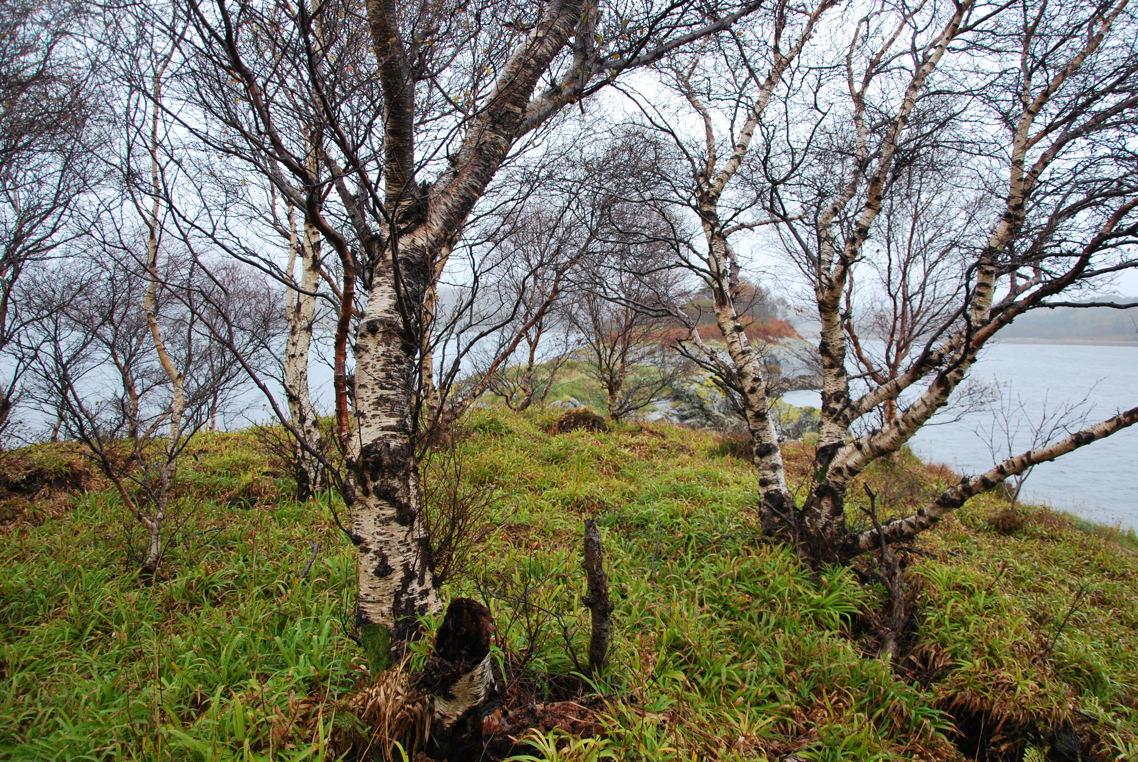 Die Insel Sgeir Caillich im Loch Creran, Schottland. Birkenwäldchen auf der zweiten Insel. Blick zur dritten Insel.